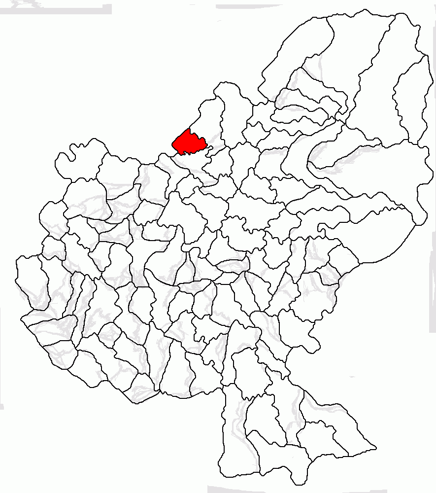 Categorie:Hărţi ale judeţului Mureş